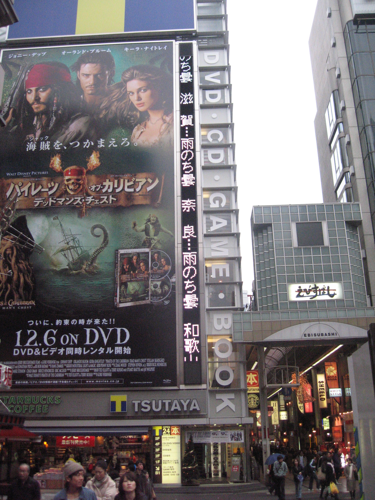 Ebisubashi, Osaka, Kansai Region.